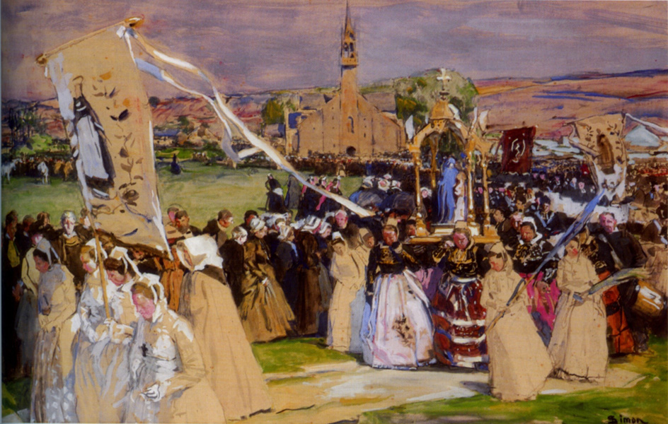 Procession au pardon de Sainte-Anne-la-Palud